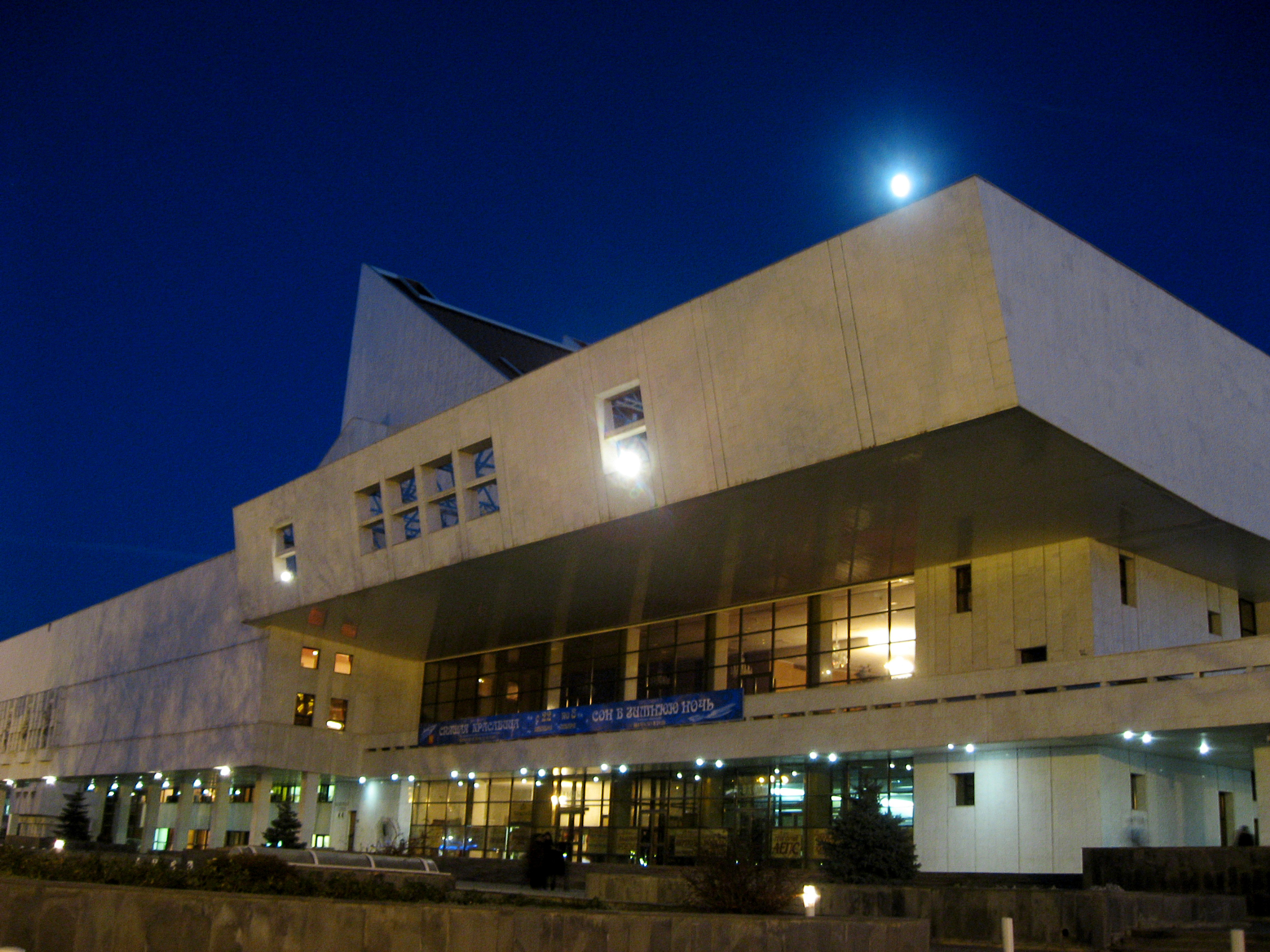 Ростовский государственный музыкальный театр